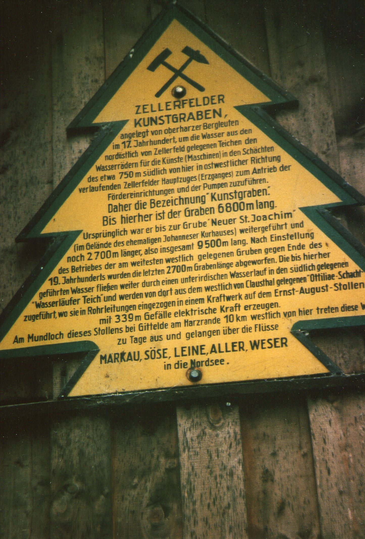 Dennert-Tanne des Zellerfelder Kunstgrabens